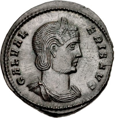 Fólis de Galéria Valéria